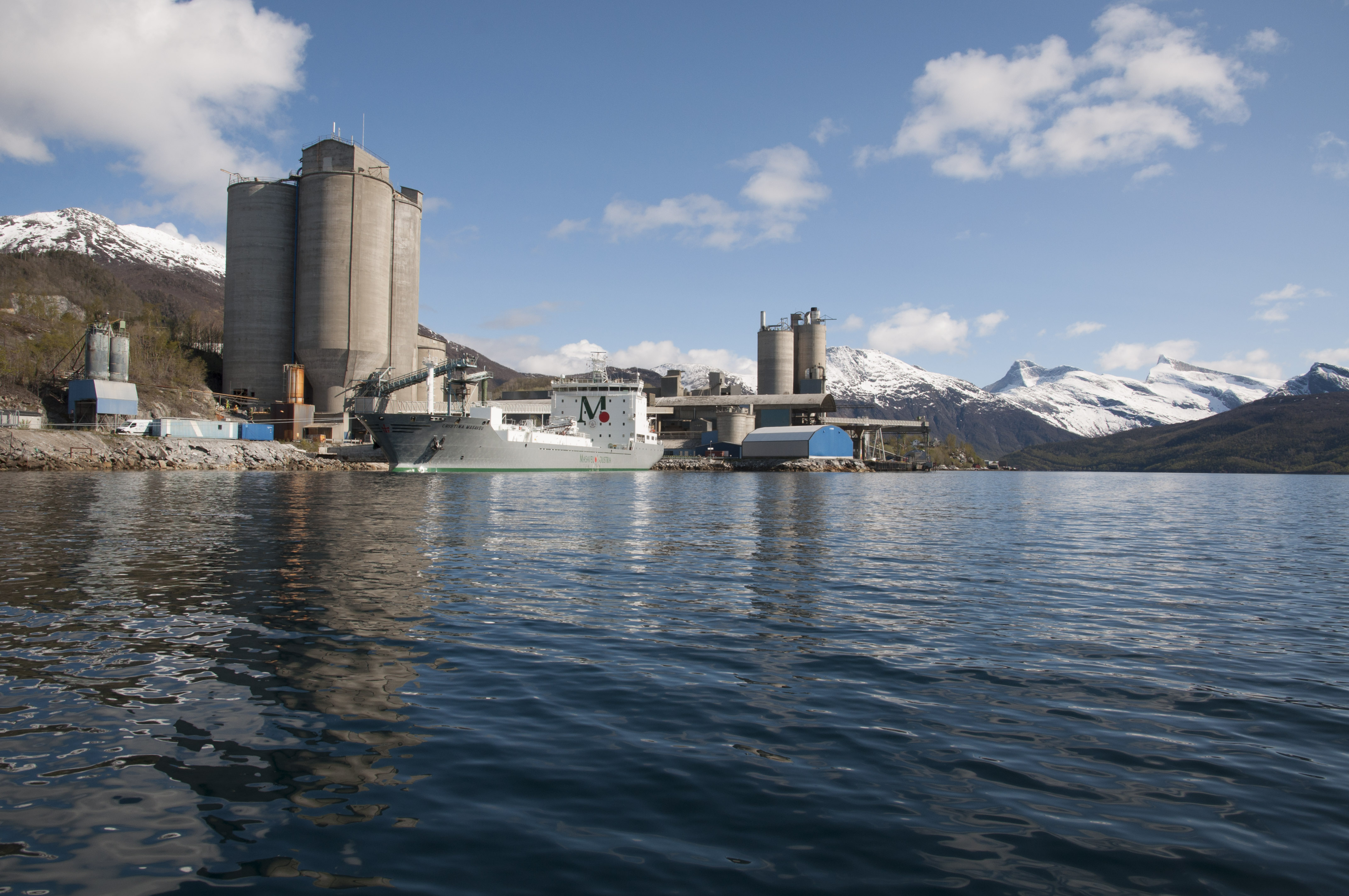 Norcems sementfabrikk i Kjøpsvik, Tysfjord.